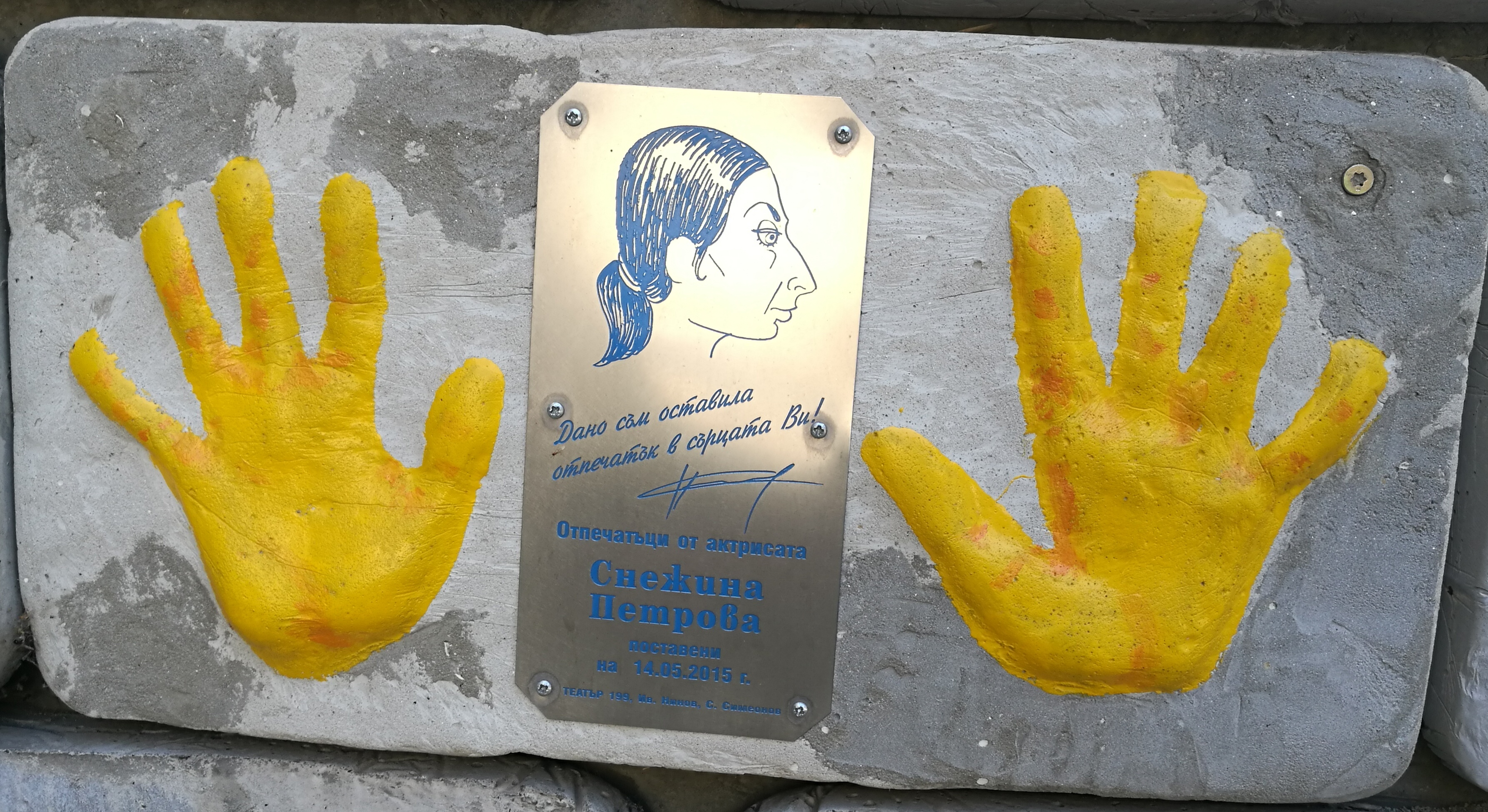 Стената на славата пред Театър 199 - пано с отпечатъци, послание и шарж на Снежина Петрова.